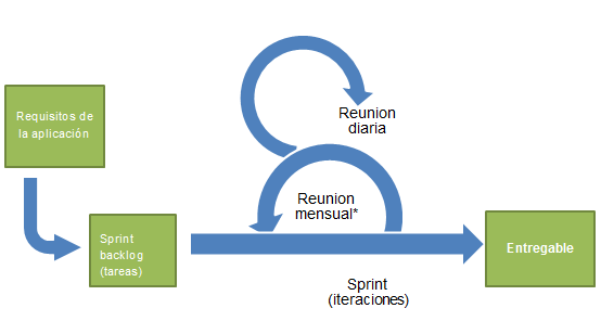 Metodología SCRUM